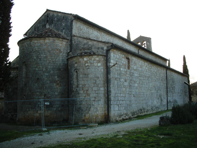 Pievescola, Casole d'Elsa, abside